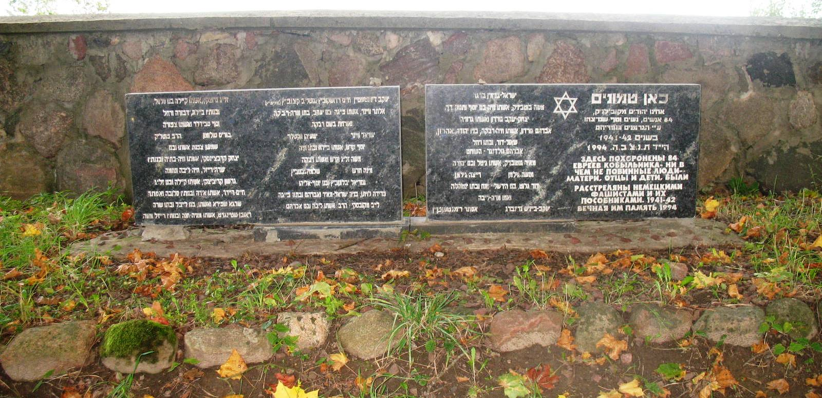 Мемориал по улице Поставской за рекой, на старом еврейском кладбище Нарочи (бывшие Кобыльники). Установлен в 1992-1994 годах израильтянами, выходцами из Кобыльников, под руководством Меера Свирского, – в память 84 убитым на этом месте евреям Кобыльников.